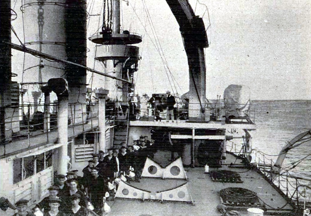 Teeausgabe auf der SMS Elsaß